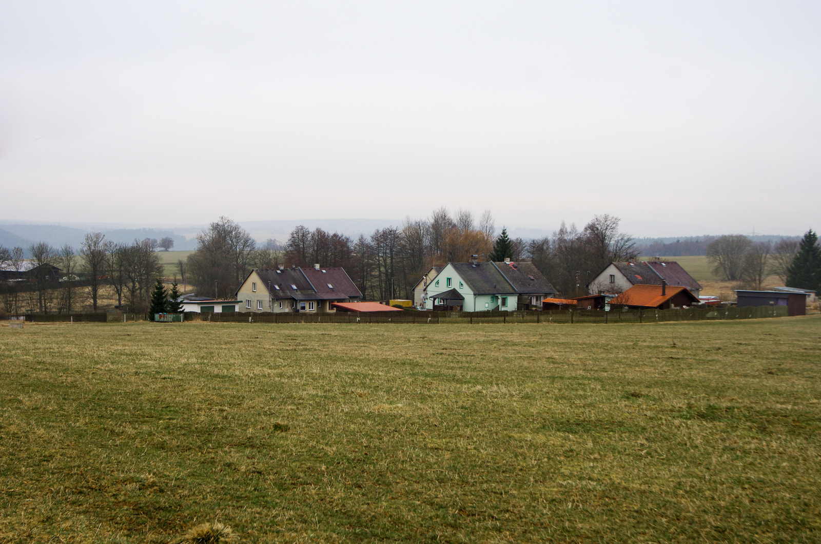 obec Lobzy, Slavkovský les, okres Sokolov